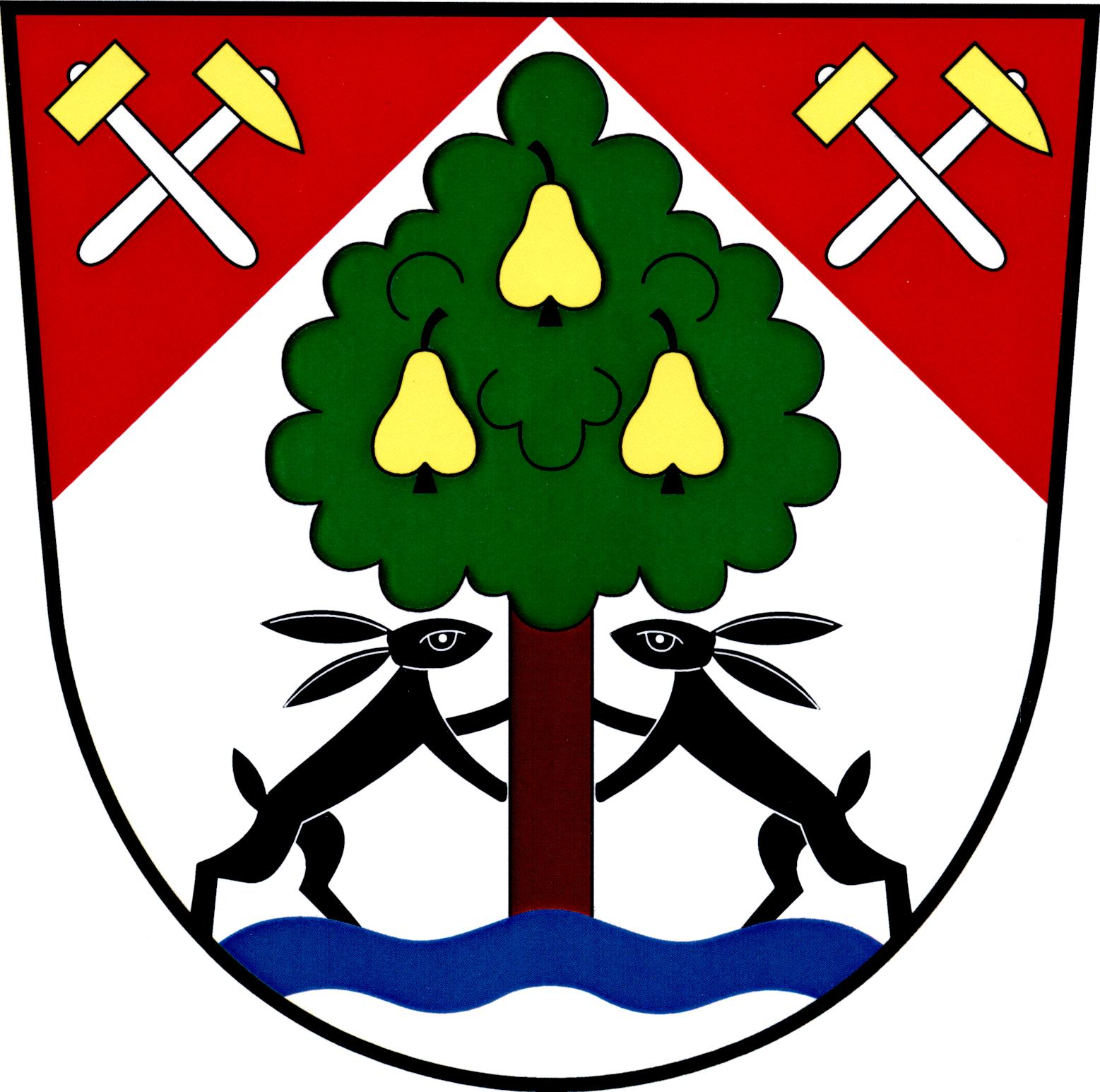 Znak obce Hředle